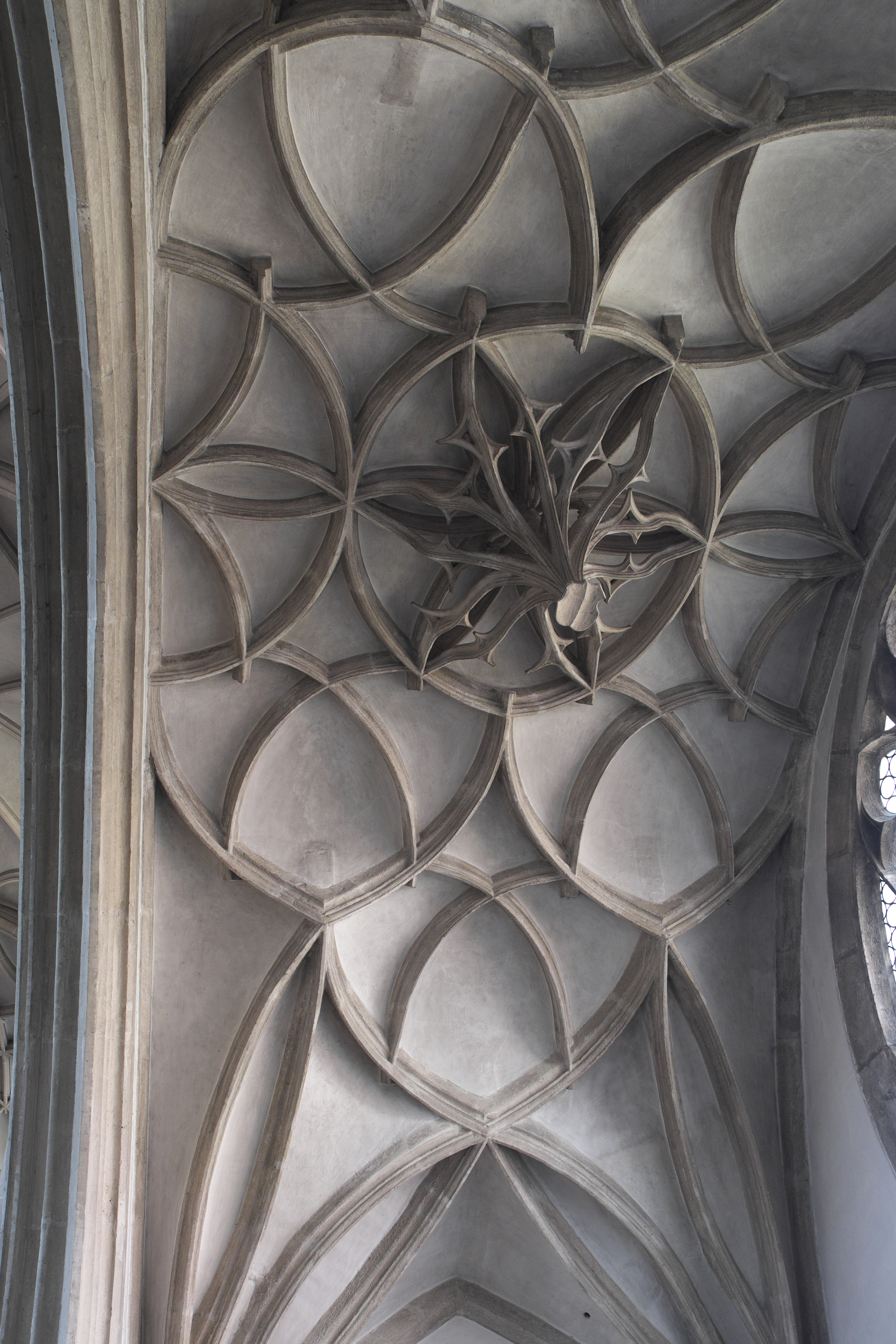 Münster Zur Schönen Unserer Lieben Frau in Ingolstadt (Bayern/Deutschland), Rippengewölbe mit Abhängling